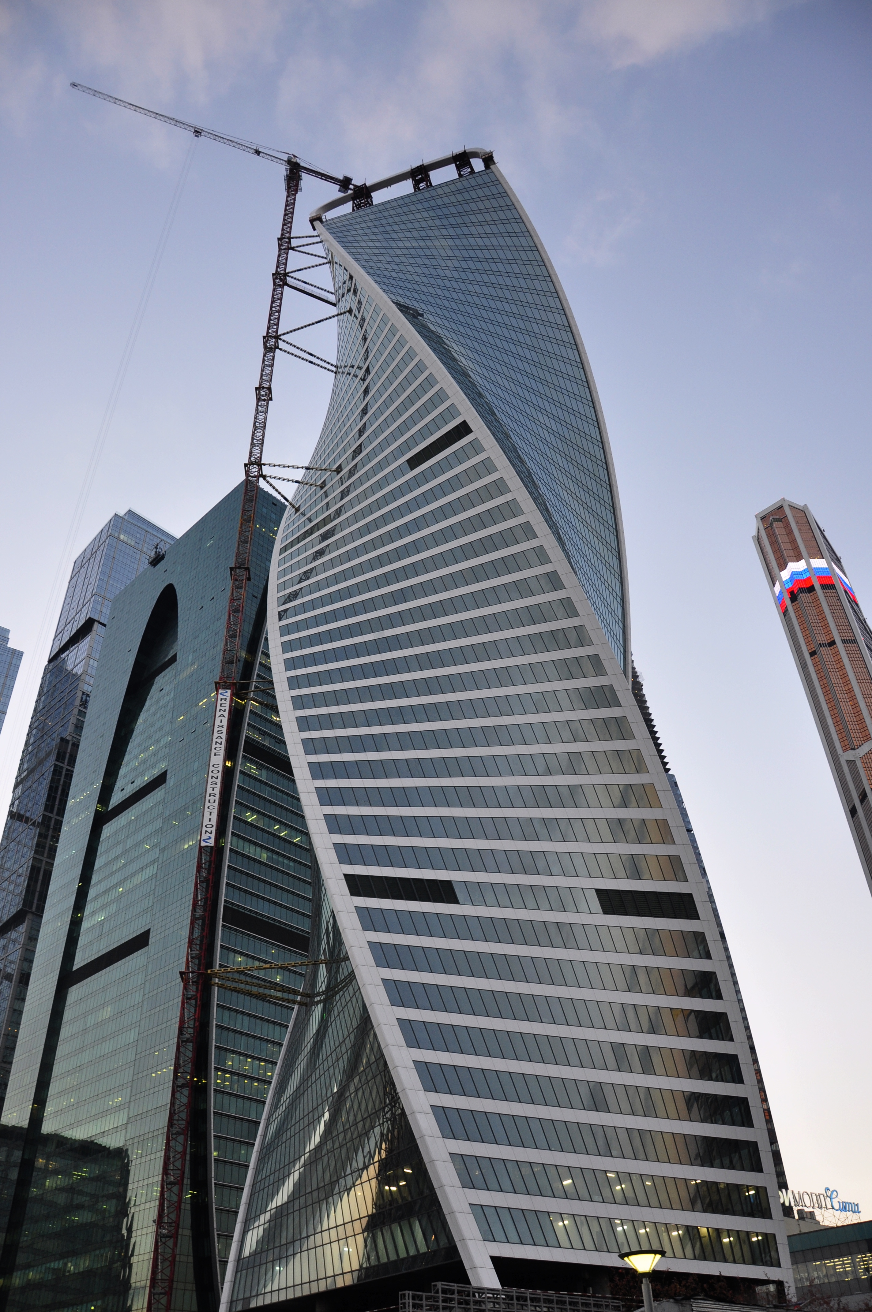 Возводится обрамление крыши башни